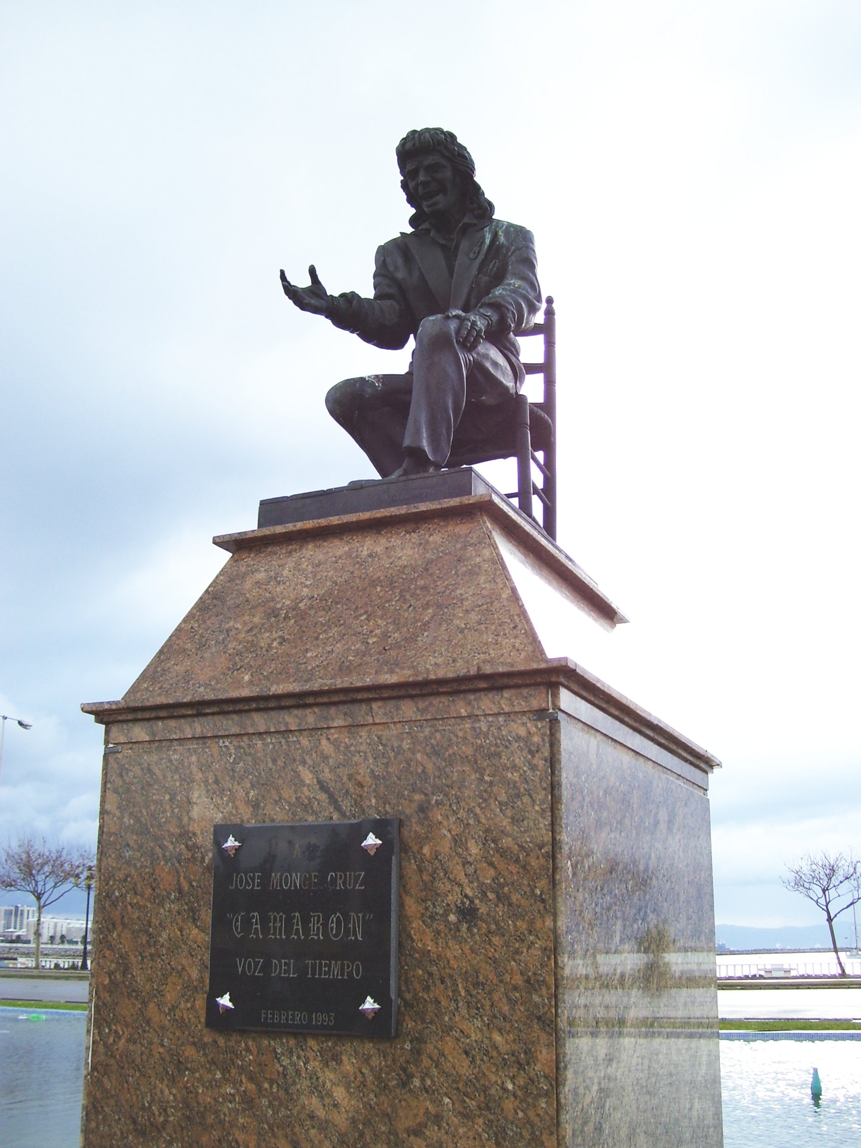 Monumento a Camaron